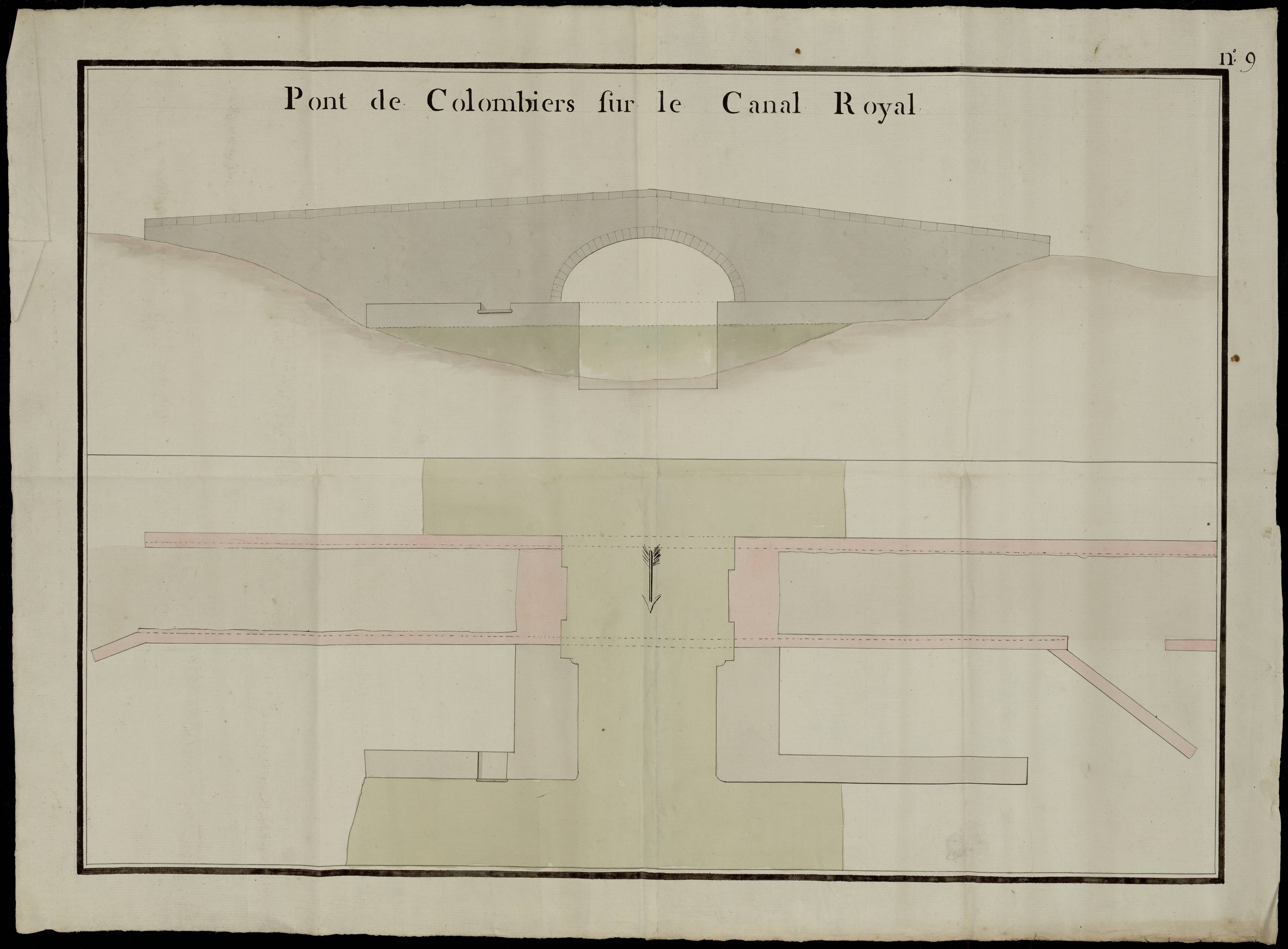 Colombiers. - Plan et élévation du pont sur le canal royal